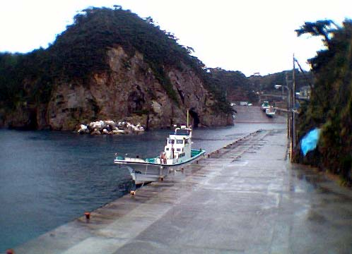 Nobushi Port, Shikine Island, Niijima, Tokyo, Jp